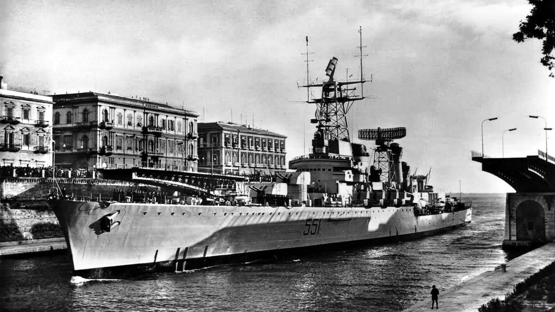 L'incrociatore lanciamissili Giuseppe Garibaldi in transito attraverso il canale navigabile di Taranto